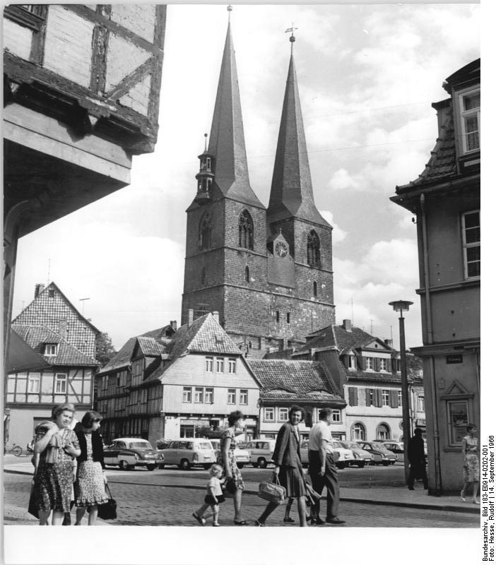 Quedlinburg, Nicolai-Kirche Zentralbild Hesse-He-Hau-14.9.1966 Quedlinburg Blick auf die Nikolaikirche